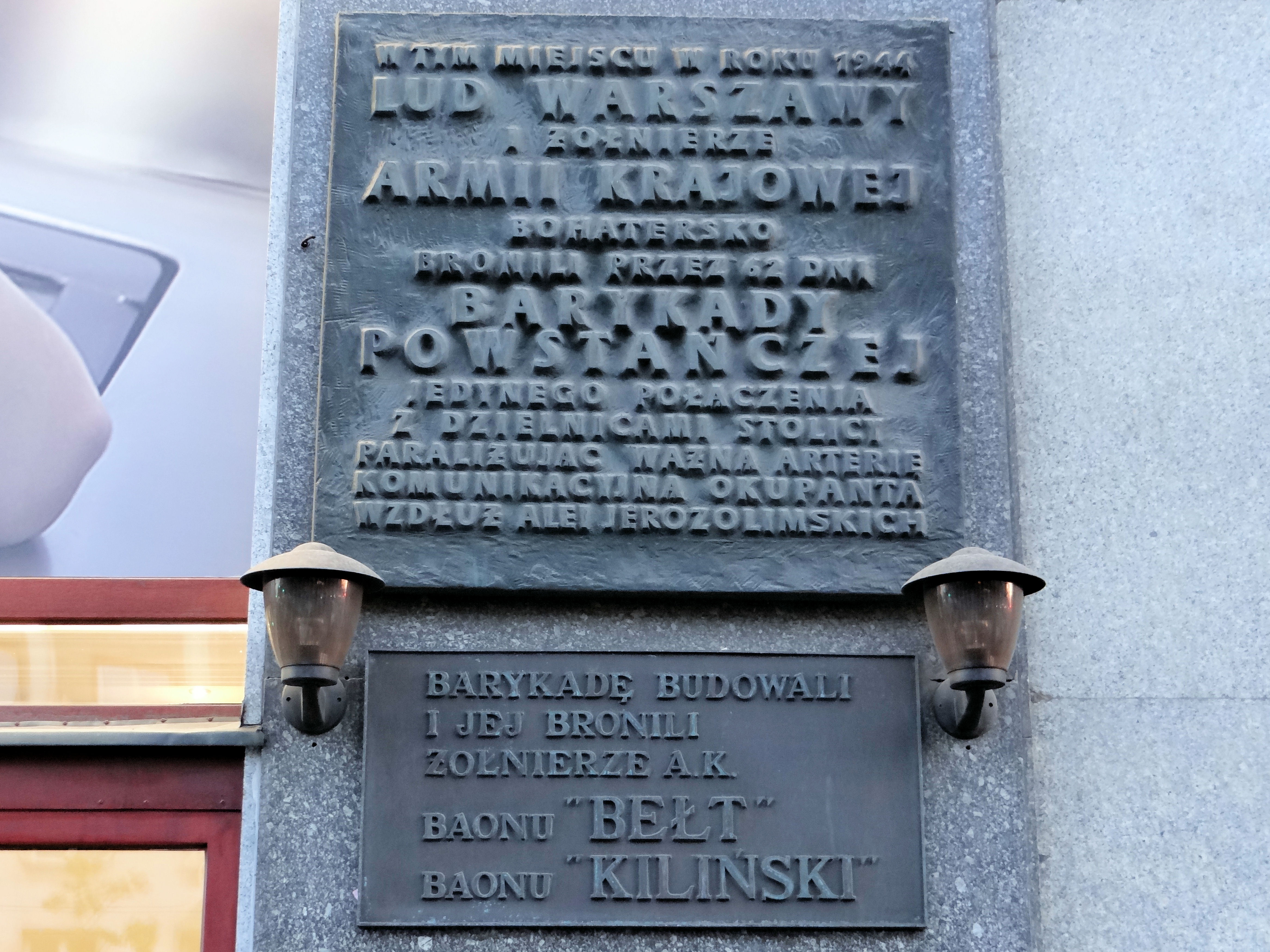 Miejsce Pamięci Narodowej w al Jerozolimskich pod numerem 23